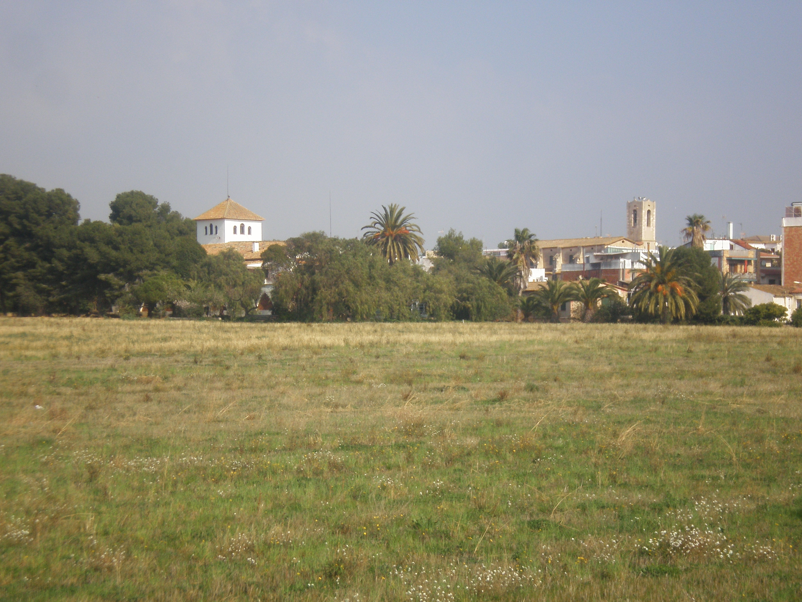 Vista del casc antic de Cunit des de la plana del Castell, amb el castell i l'església de Sant Cristòfol al fons